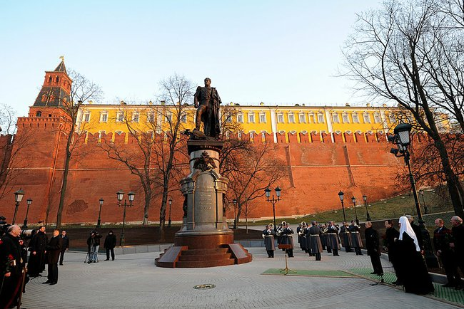 Торжественное открытие памятника императору Александру I в Москве, 20 ноября 2014 года.